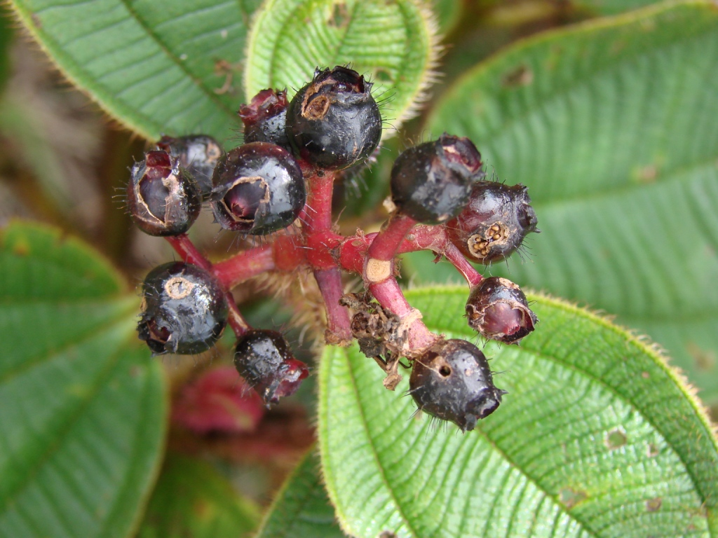 fruits of Tococa guianensis - MELASTOMATACEAE APA do Rio Descoberto - Chapada Imperial - Distrito Federal - Brasil.